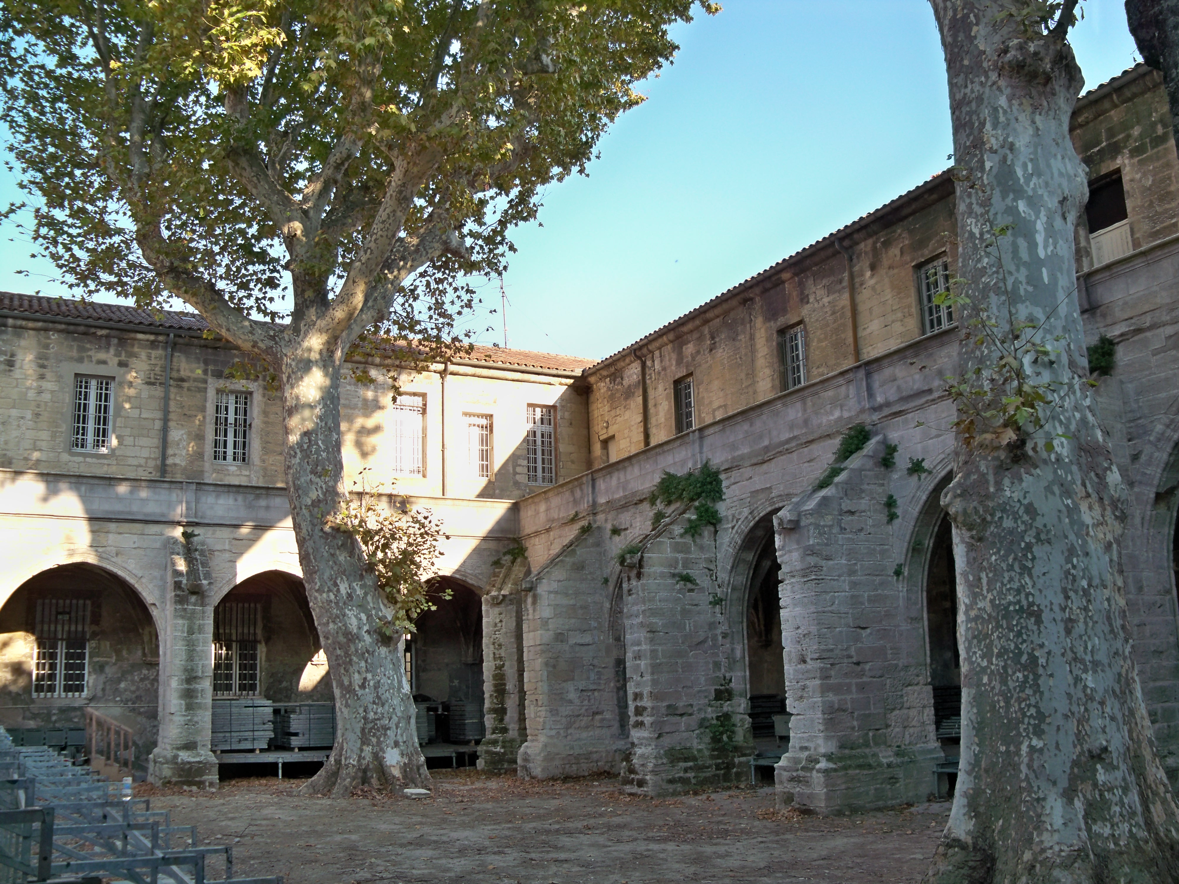 Cloitre des Célestins à Avignon (84) .